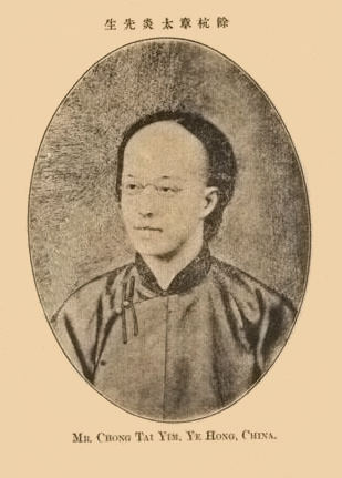 1906年訄書重訂本卷首的章太炎像